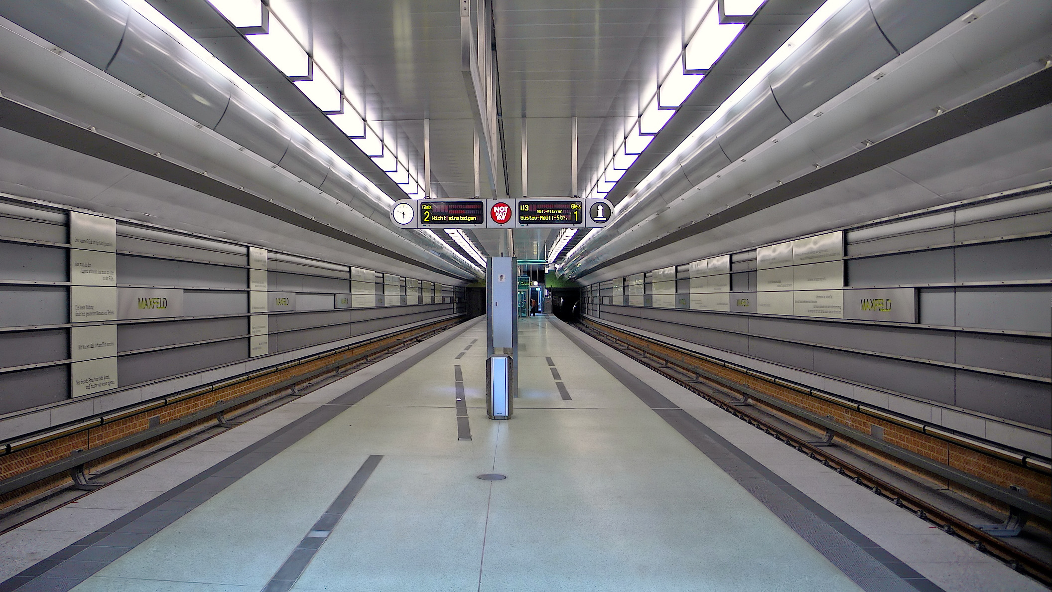 U-Bahnhof Maxfeld der U-Bahn Nürnberg, Bahnsteigebene, Blick von Westen